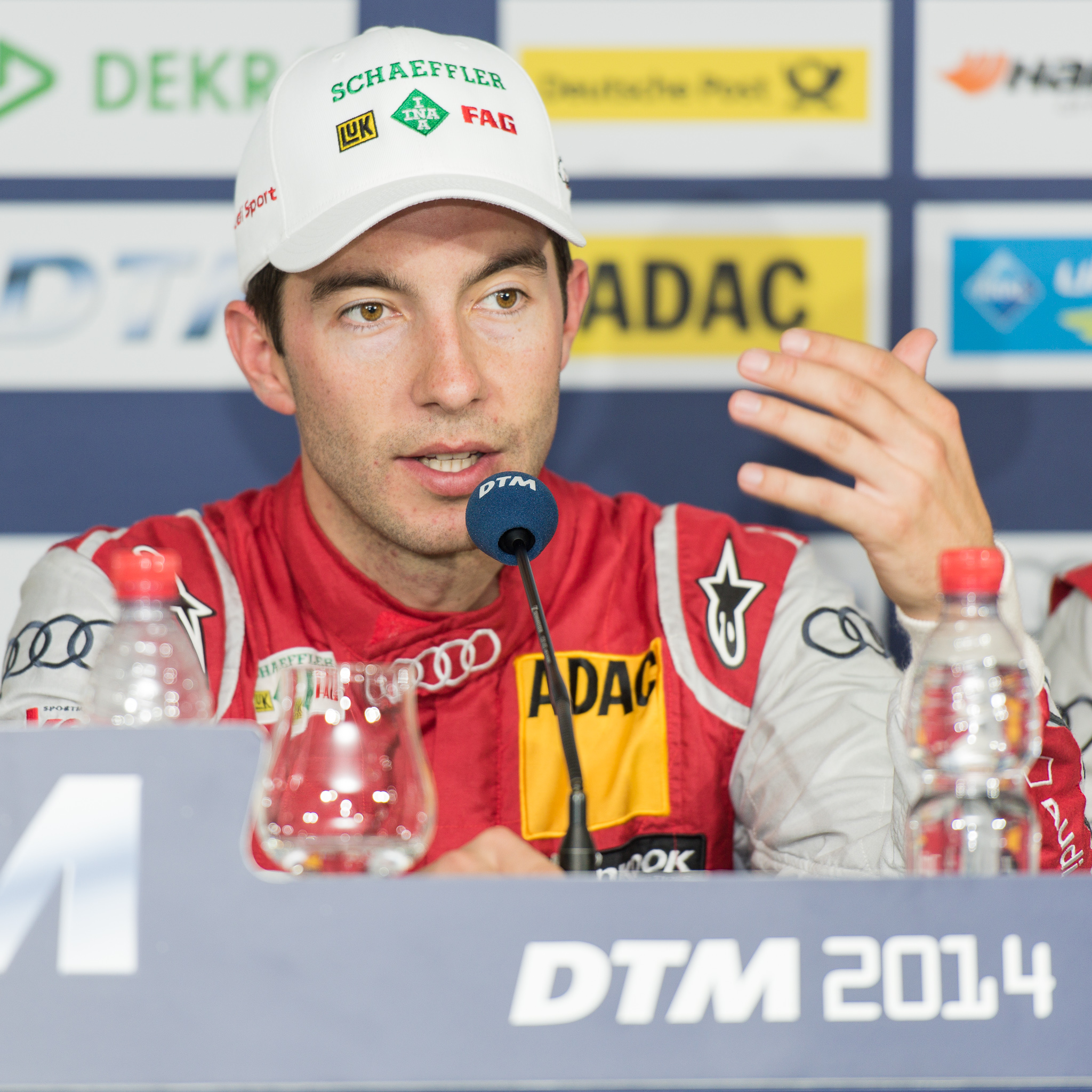 DTM,Deutsche Tourenwagen Masters,Hockenheimring,Mike Rockenfeller,Motorsport,Phoenix Racing GmbH,Pressekonferenz